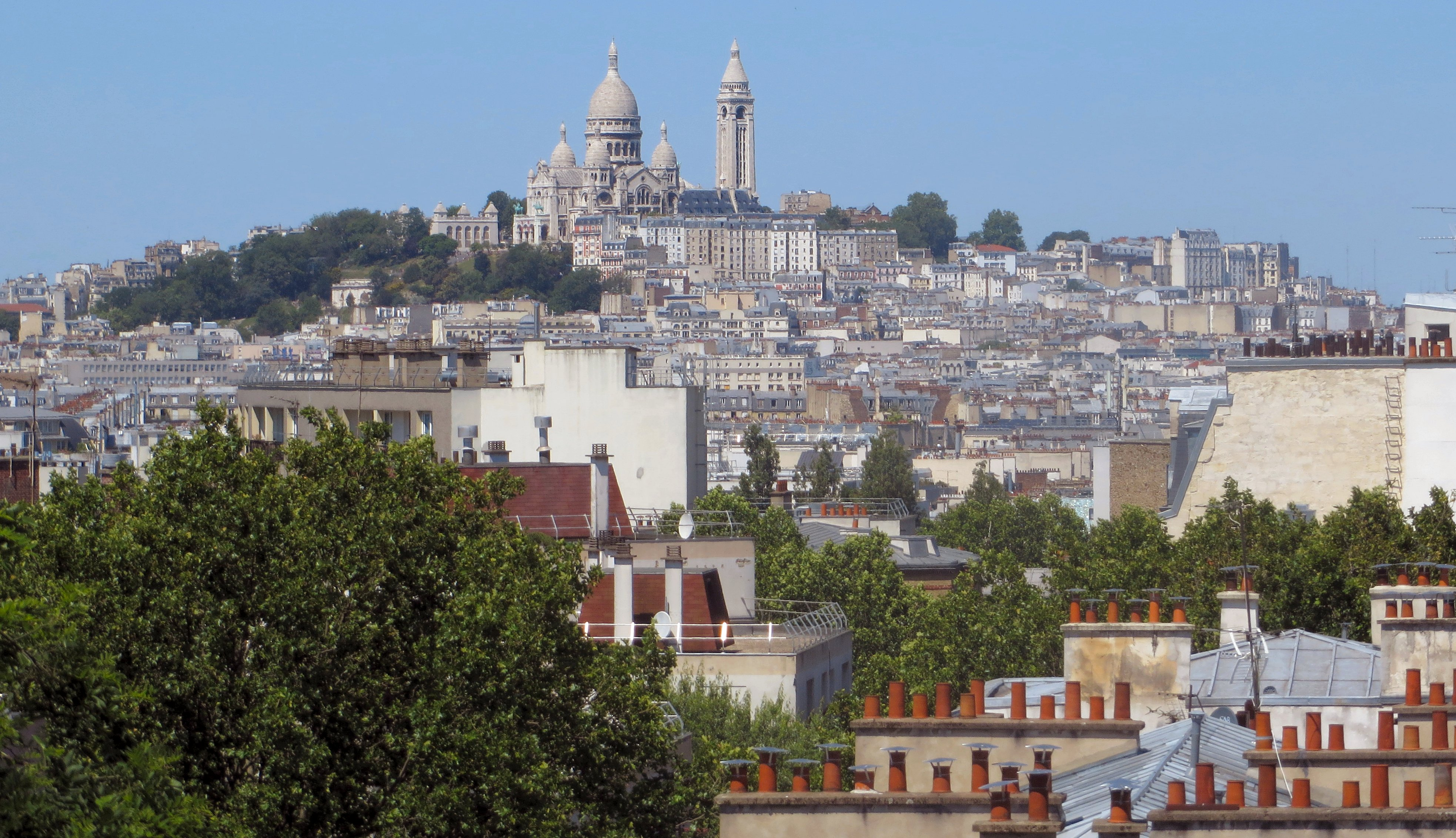 Vue depuis la Butte Bergeyre en direction de Montmartre.